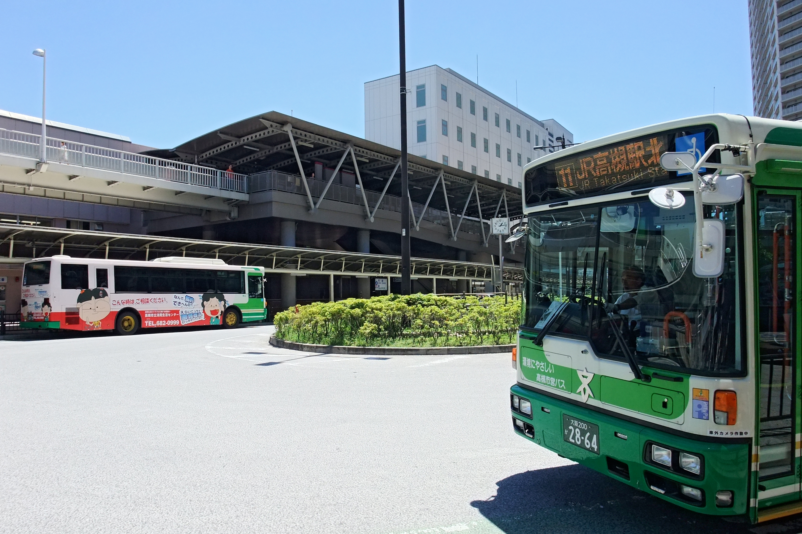 Takatsuki Station in Takatsuki, Osaka prefecture, Japan